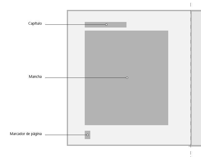 Esquema explicativo para o Grid/Malha Retangular utilizada principalmente na diagramação de Livros.